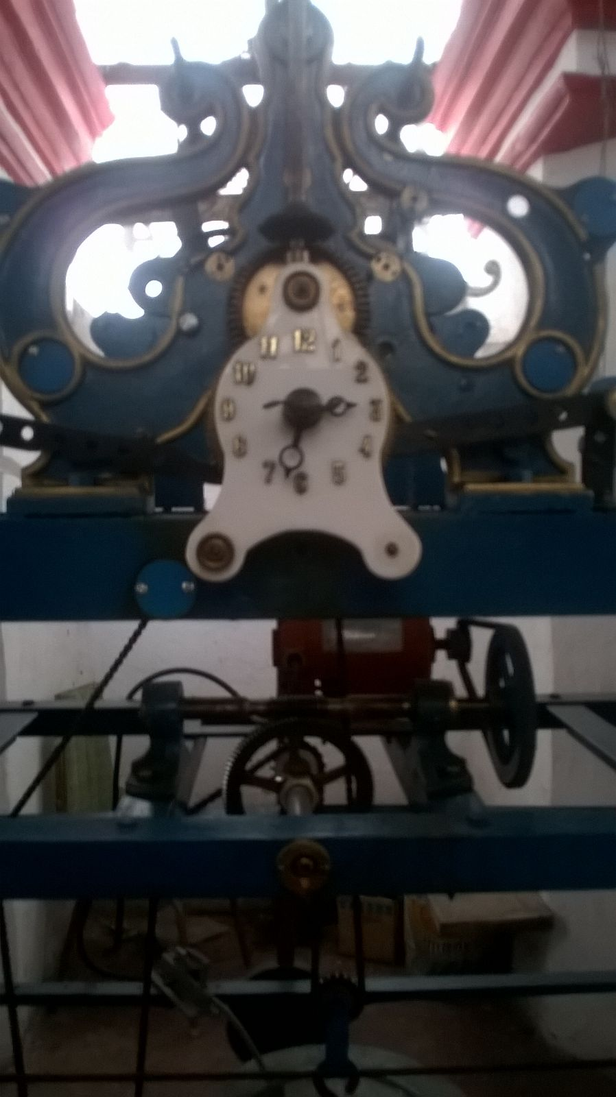 Fotografía de la maquinaria del reloj fundado en 1910